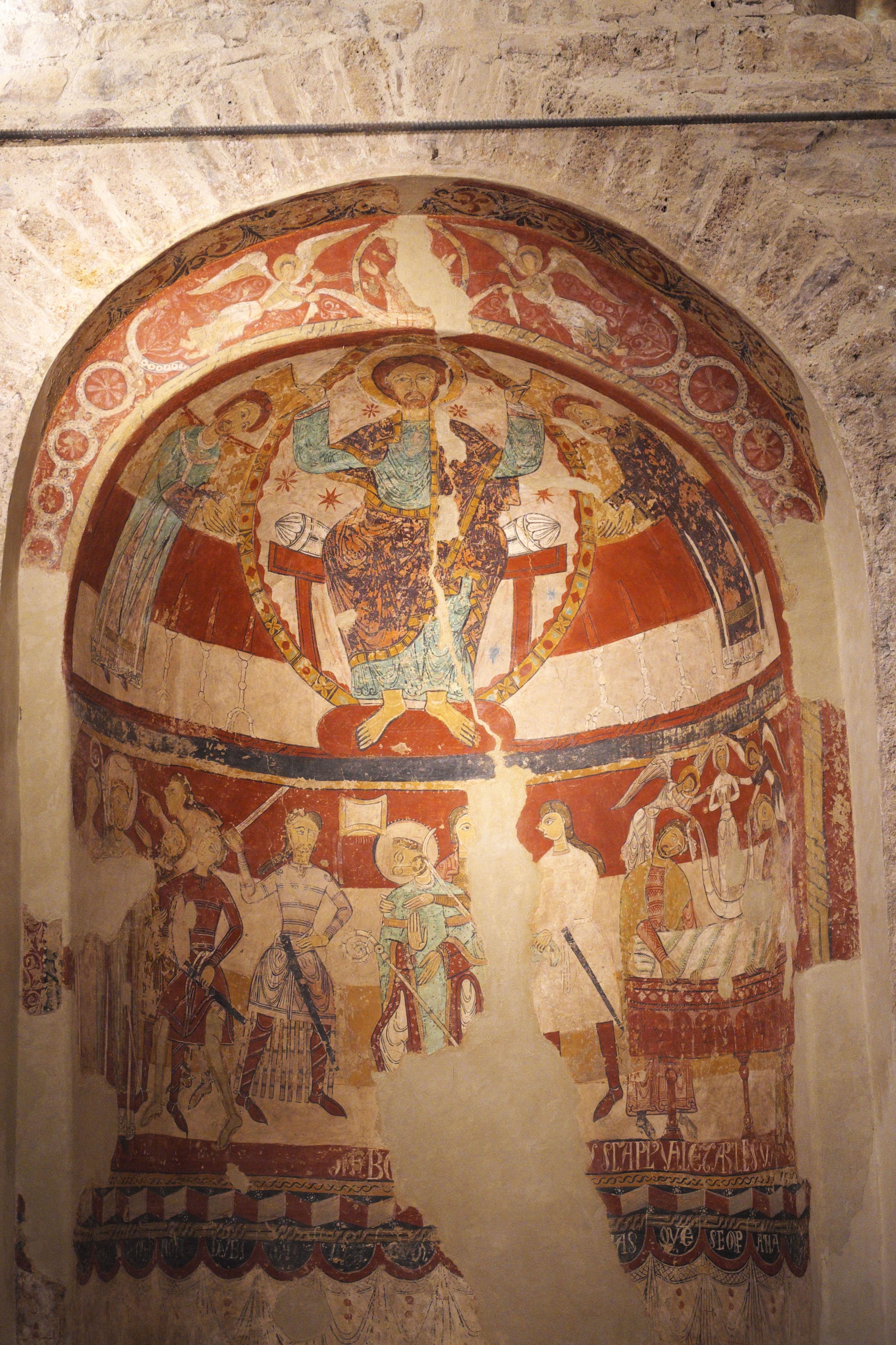 Kirche Santa Maria (Conjunto monumental de Egara) in Terrassa in der Provinz Barcelona (Katalonien/Spanien), Wandmalerei in der südlichen Seitenapsis, Darstellung: Martyrium von Thomas Becket